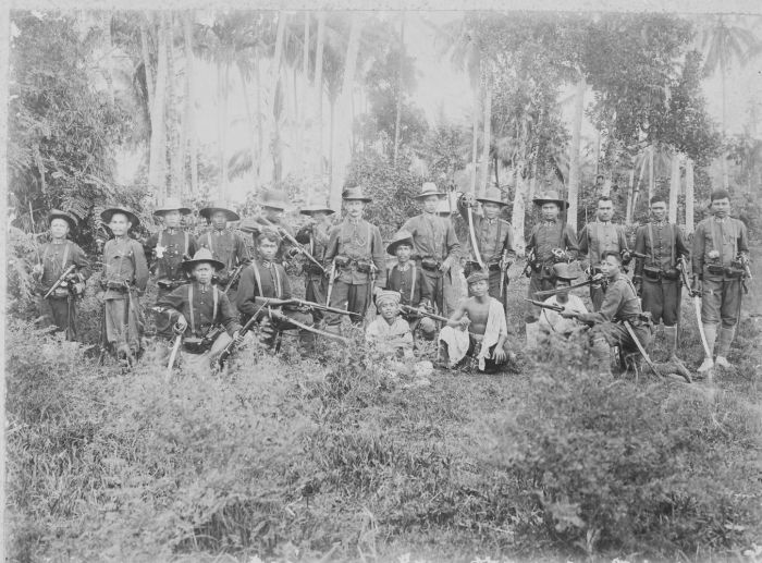 Foto. Portret van een groep militairen van het KNIL